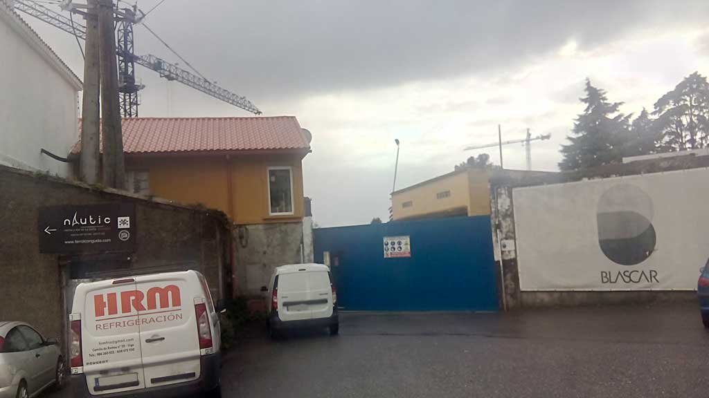 Acceso a Blascar na Graña.